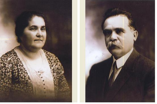 לאה וhe:דוד איזמוז'יק, ממייסדי תל אביב